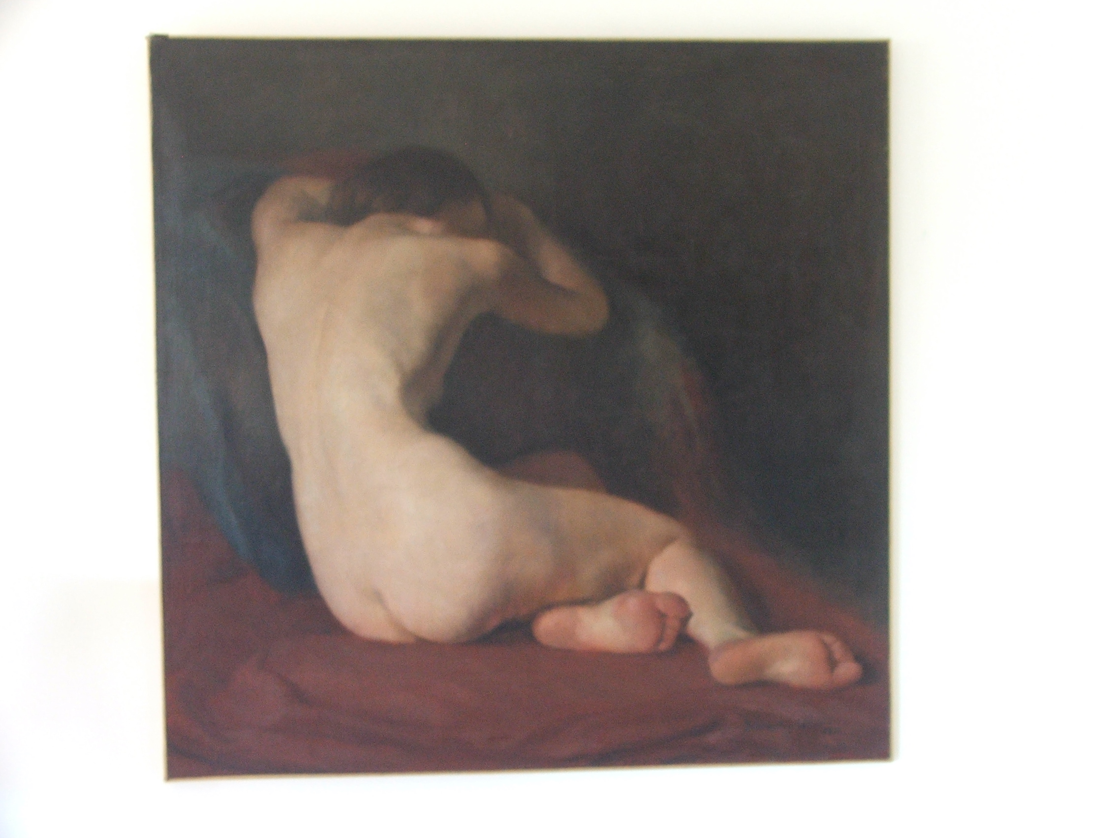 painting